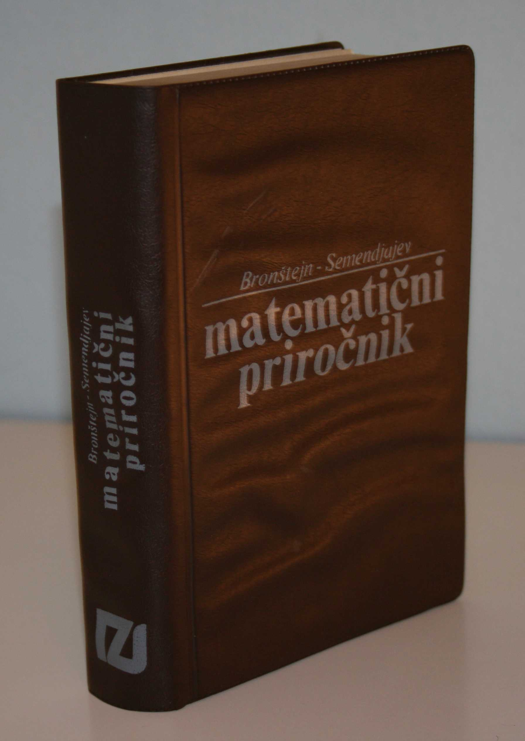 Bronštejn, Semendjajev, Matematični priročnik, Tehniška založba, Ljubljana 1975, 4. ponatis